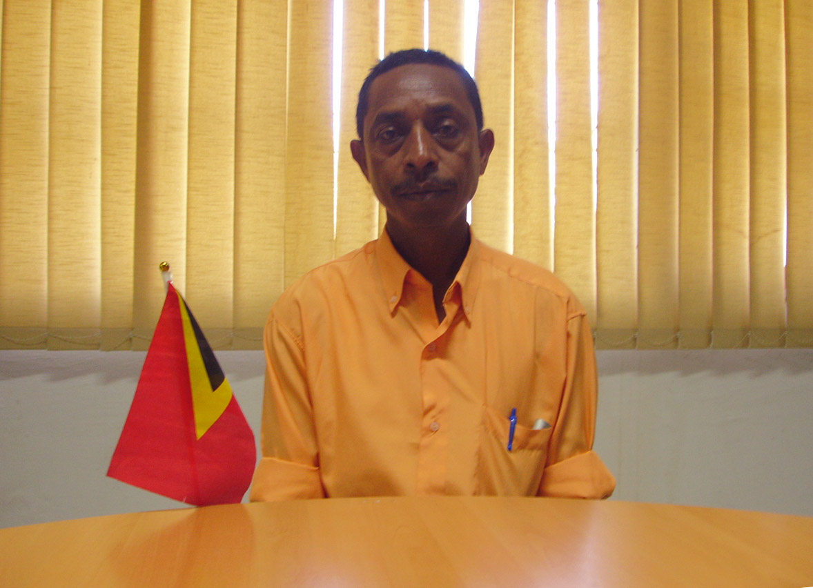 Paulo dos Santos, Administrator des Subdistrikts Balibo